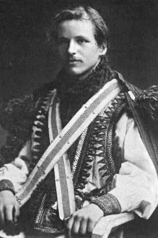 Петро Шекерик-Доників. Жаб'є